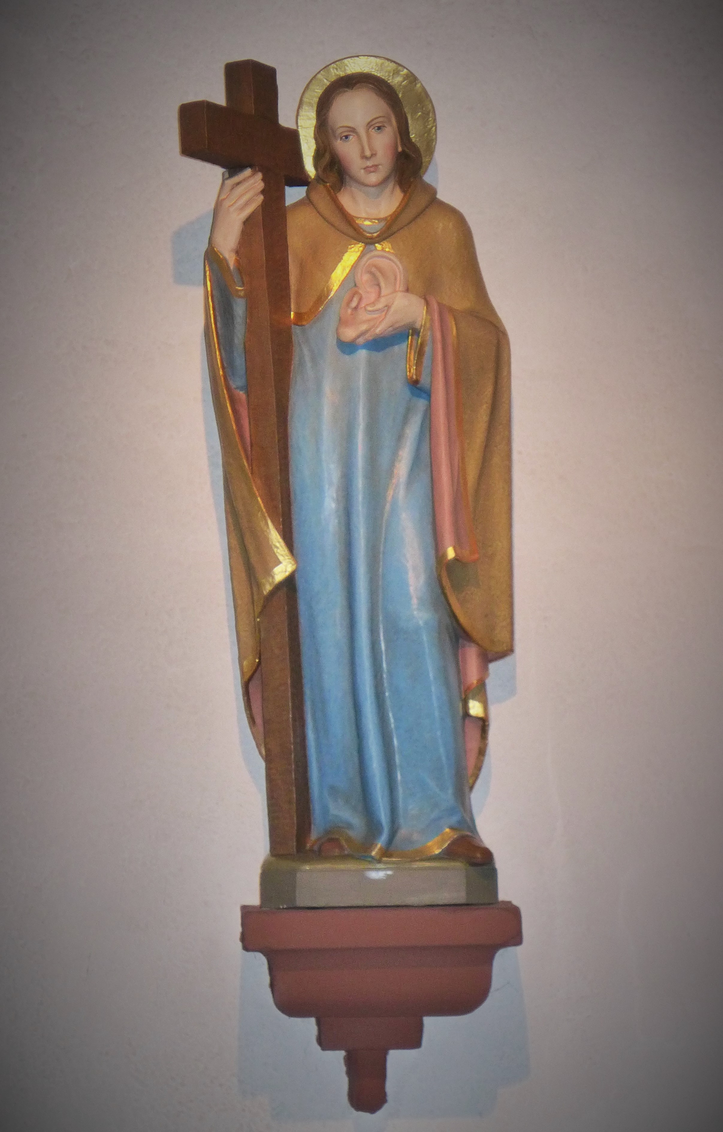 Orannakapelle (Berus), Orannastatue in der Kapelle